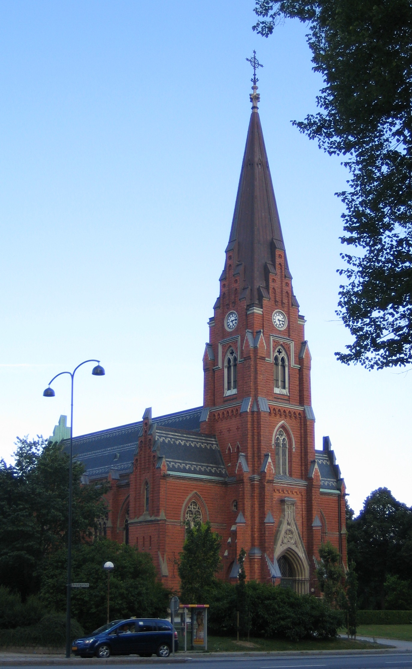 Allhelgonakyrkan in Lund, Sweden.